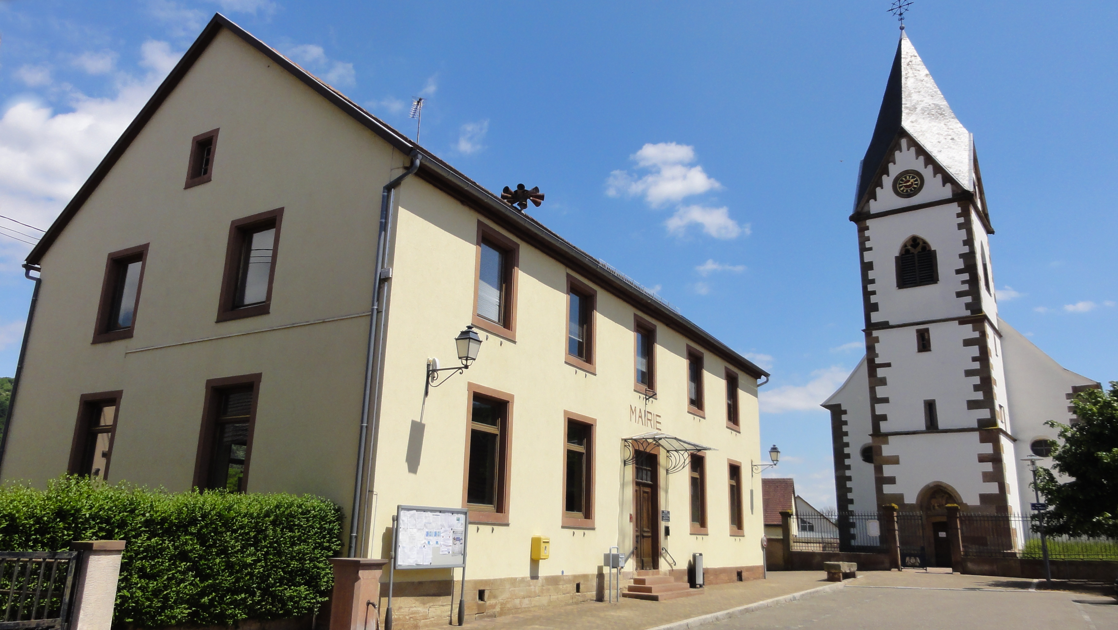 Alsace, Bas-Rhin, Gresswiller, Mairie (XIXe): .